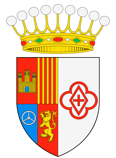 Escudo y corona del Condado de Lacambra